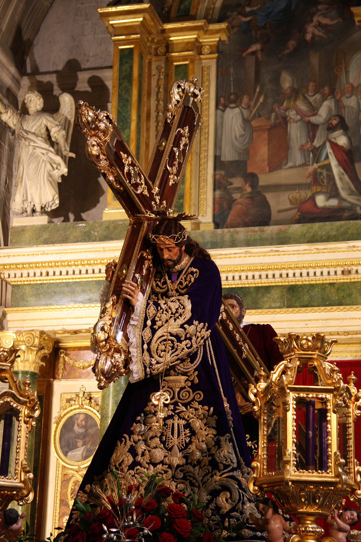 Impresionante nazareno, del siglo XVI, que pasea cada madrugada de Jueves Santo, entre el fervor de las gente, con solemne paso por las calles de Jaén.